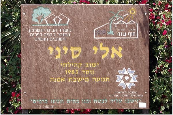 אלי סיני התמונות באדיבות קטיף.נט (קישור) אתר האינטרנט של גוש קטיף. צילם: מוטי סנדר.